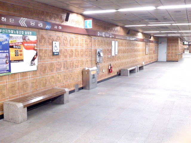 Busan Dangni_subway_station